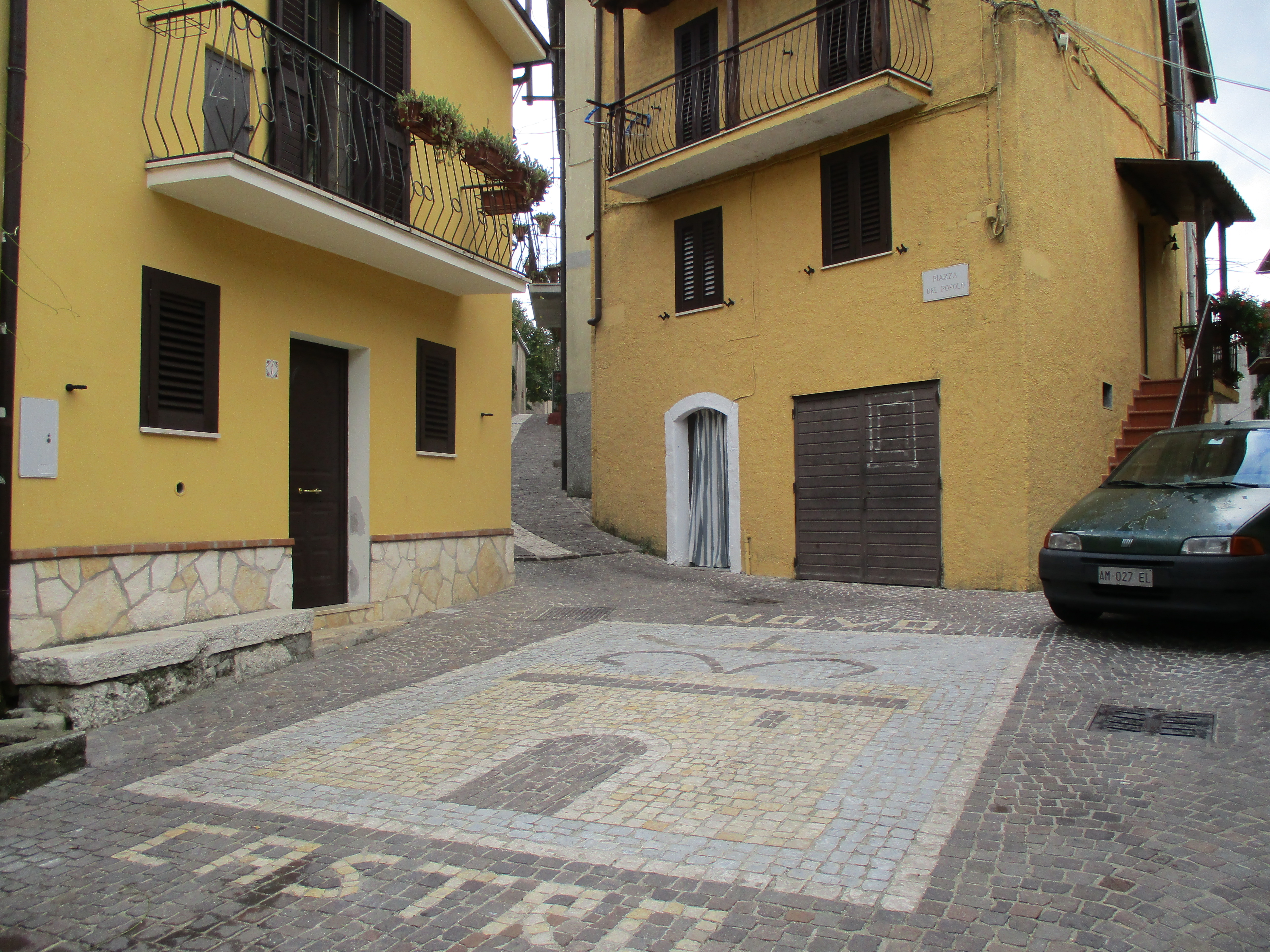 Scorcio del borgo antico